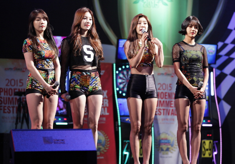 걸스데이(Girl's Day) 2015 피닉스 섬머 페스티벌 일산 킨텍스